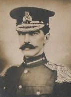 Il generale britannico James Melville Babington, distintosi durante la Grande Guerra Boera e la Prima guerra mondiale